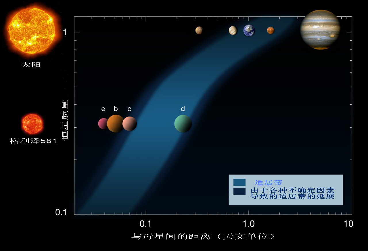 适居区示意图